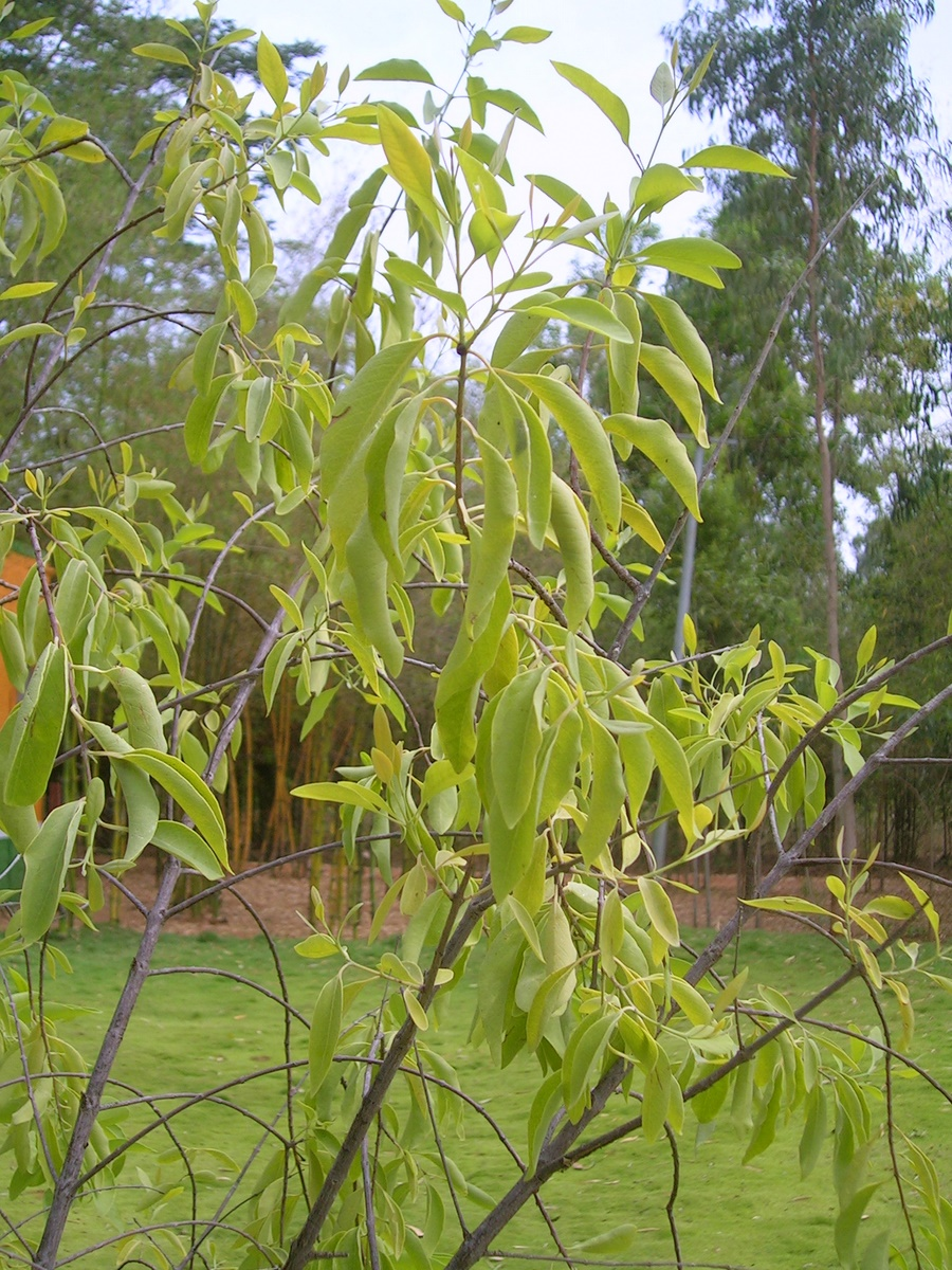 Santalum album sapling from Karnataka India